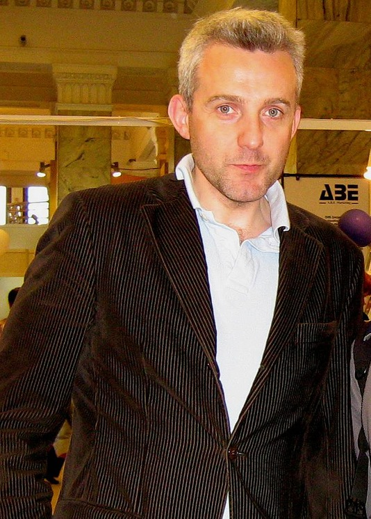 Hubert Kirył Urbański (ur. 23 marca 1966 w Warszawie) – polski aktor, dziennikarz i prezenter telewizyjny.